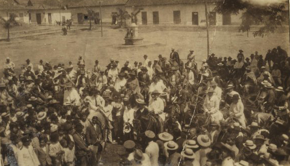 Gramalote Norte de Santander, Colombia. Foto de los años 40.